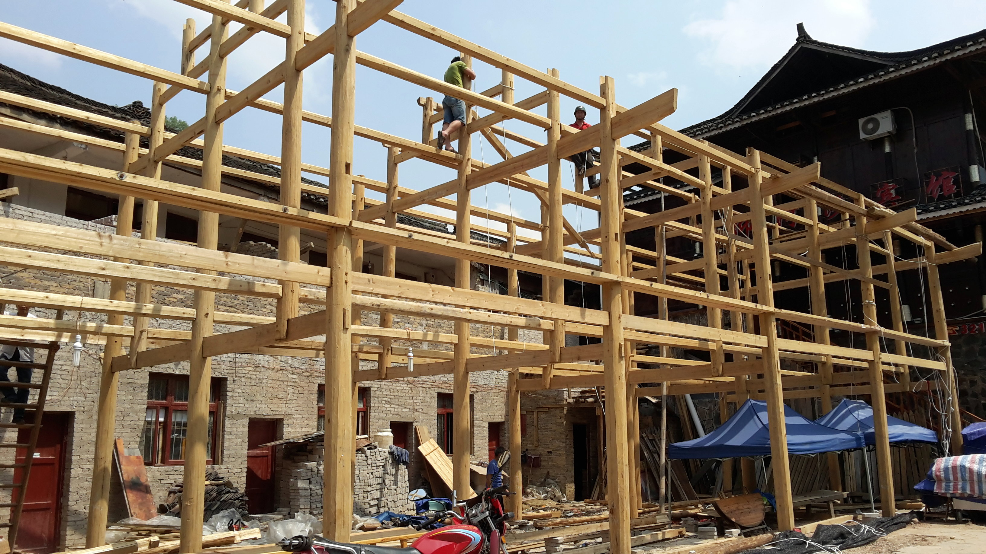 Maison en ossature bois des Miao, dans le Village miao des mille foyers de Xijiang, province de Guizhou, en Chine.